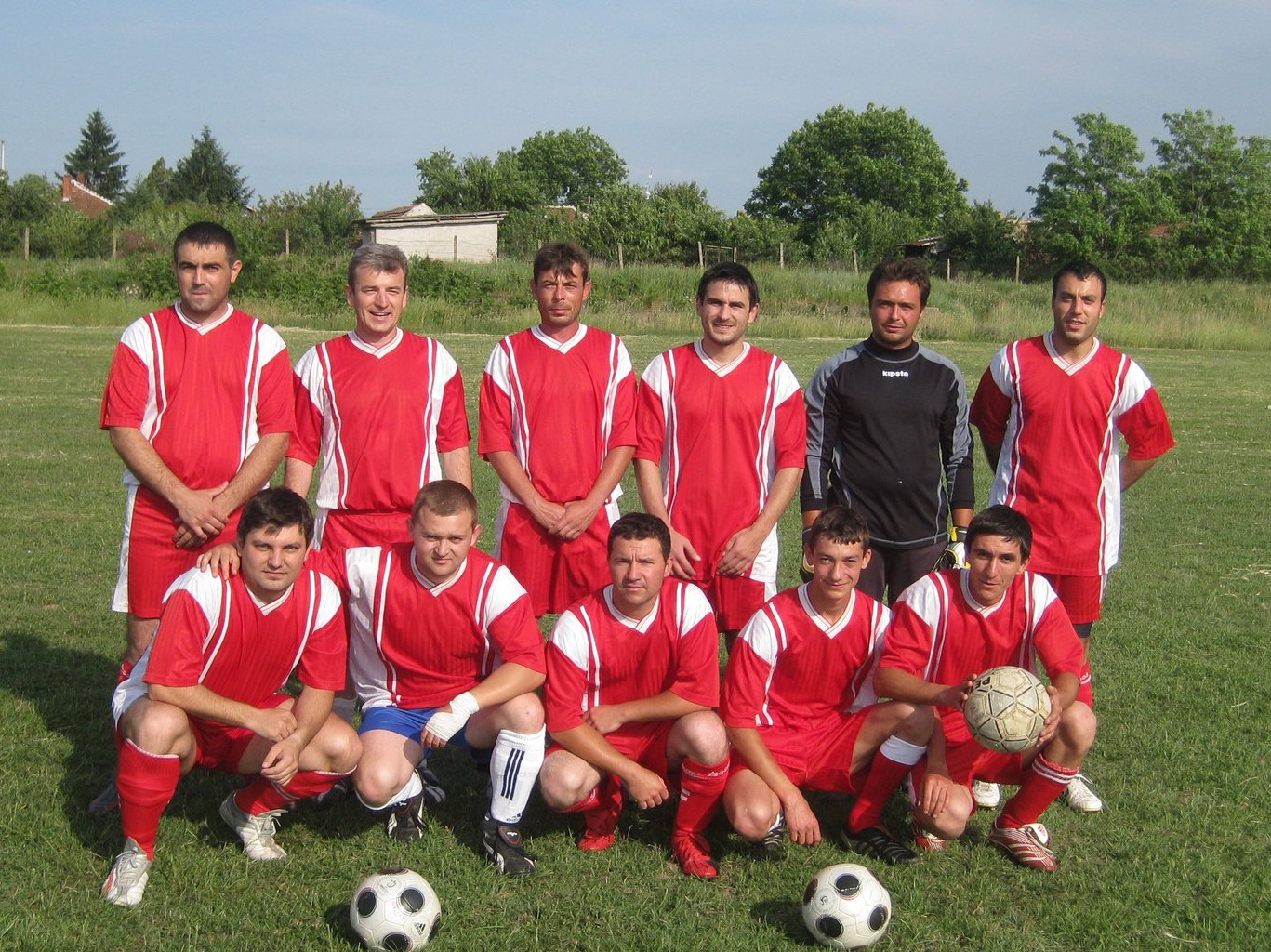 Футболен отбор „Левски“ Покрайна